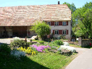 Fontenelle (Territoire de Belfort) ferme typique Photo prise par LP90 en mai 2004 Licence GFDL LP90 mai 2004